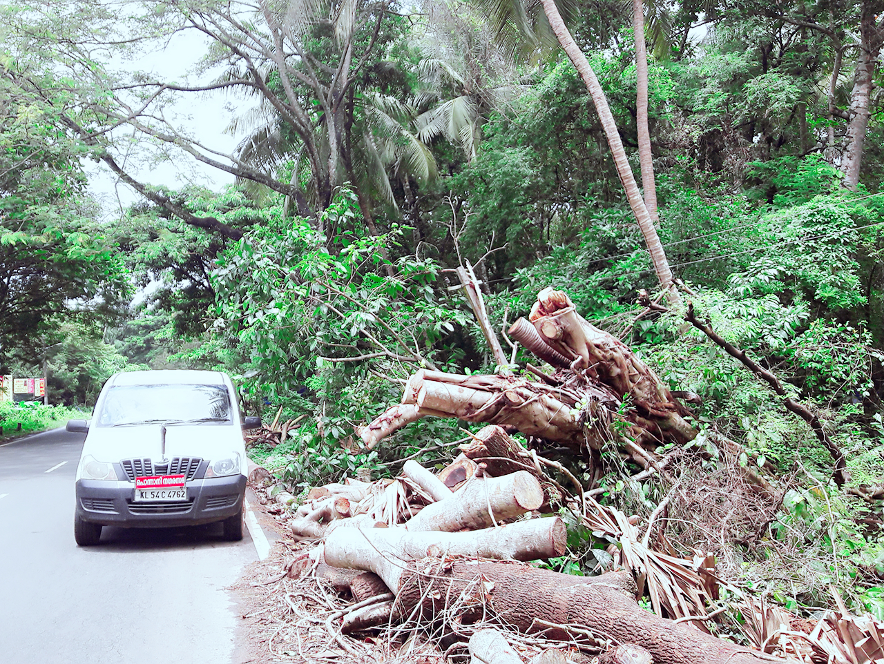 മലപ്പുറം ജില്ലയിലെ പൊന്നാനി നഗരസഭയുടെ സഹായത്താല്‍ പറിച്ചു നടല്‍ പ്രക്രിയ വഴി പൊന്നാനി മാതൃ ശിശു ആശുപത്രിയിലേക്ക്‌ മാറ്റി നടാന്‍ വേണ്ട ആവിശ്യങ്ങല്‍ക്കായ് അധികൃതര്‍ നഗരസഭയില്‍ നിന്ന് മരം സന്ദര്‍ശിക്കാന്‍ വരുന്നു.